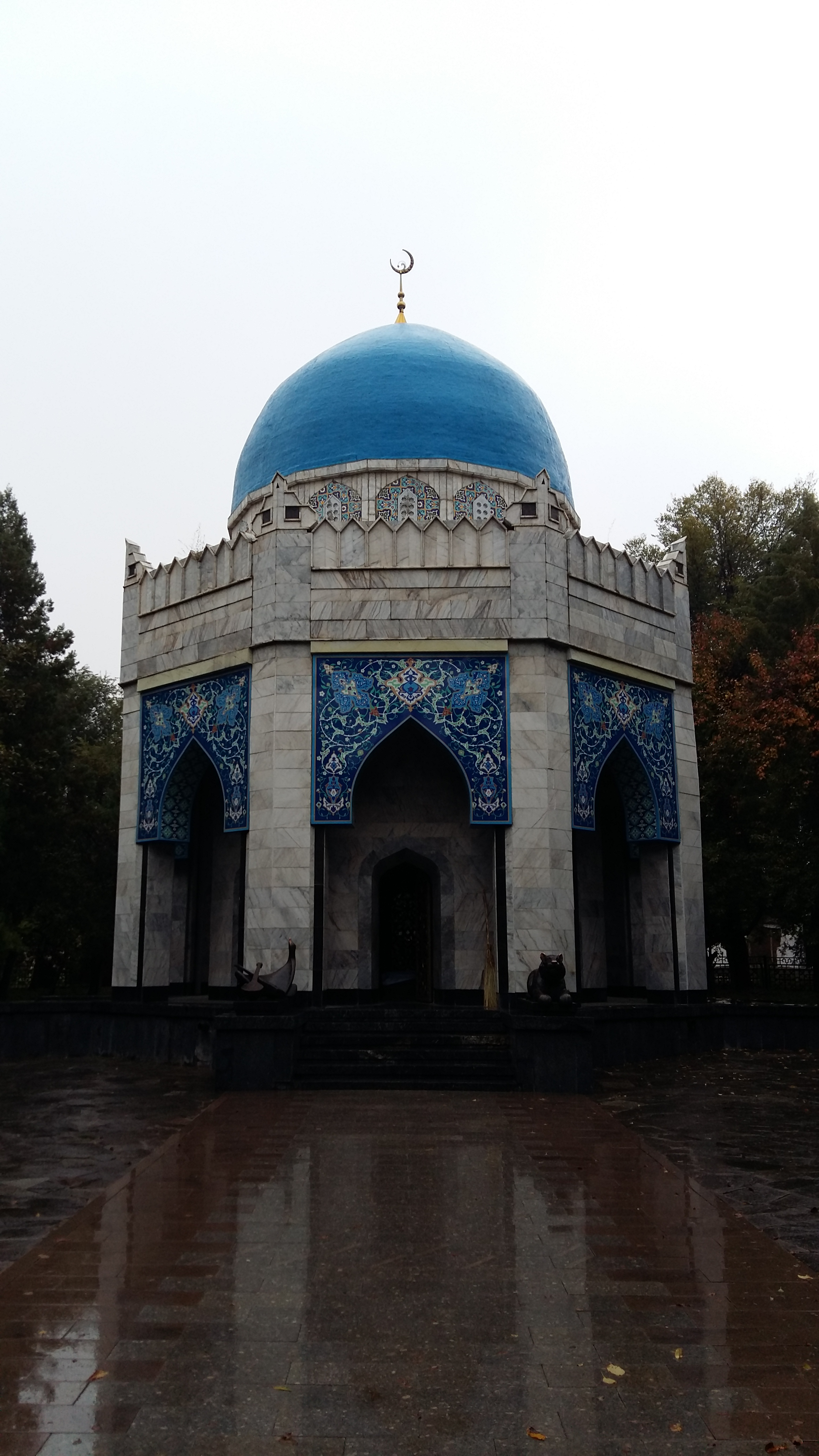 Мавзолей Джамбула Джабаева. Расположен на территории комплекса дома-музея.